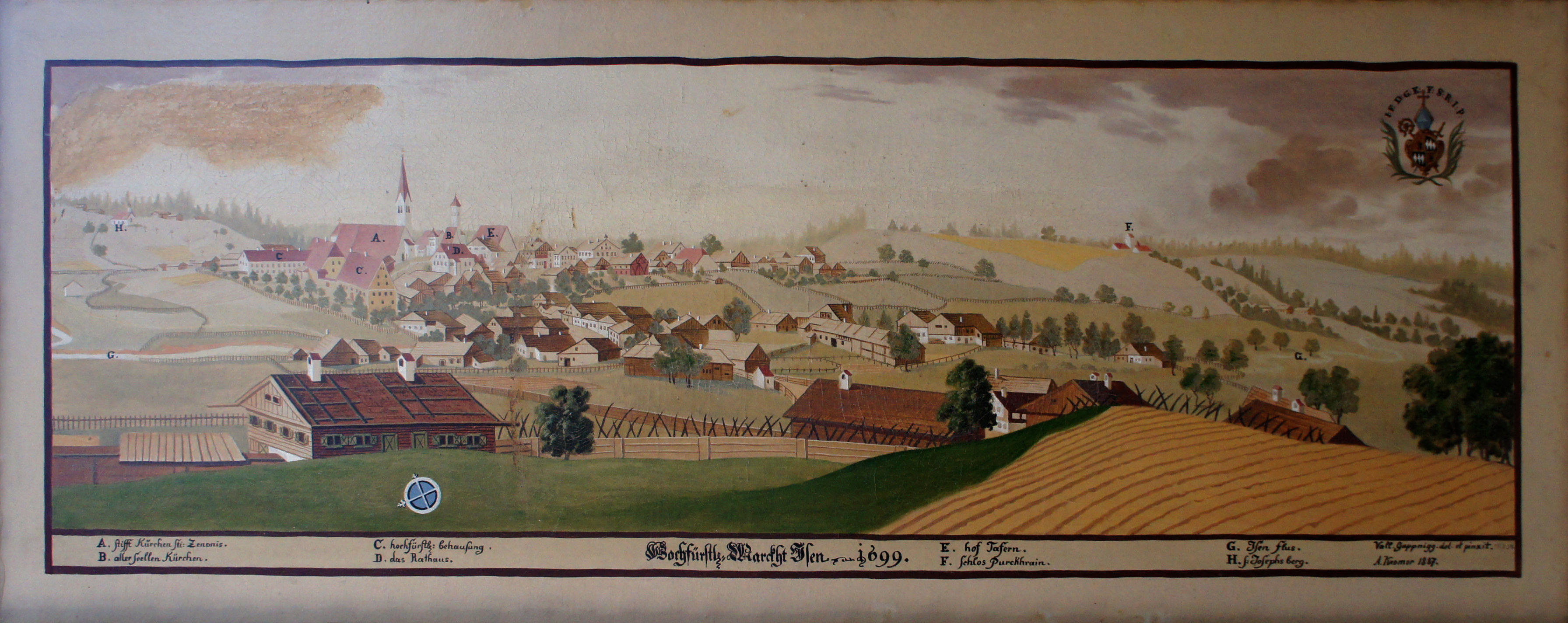 Gemälde aus einer Serie mit Darstellungen von Besitztümern des Hochstifts Freising im Fürstengang zwischen Fürstbischöflicher Residenz und Freisinger Dom.